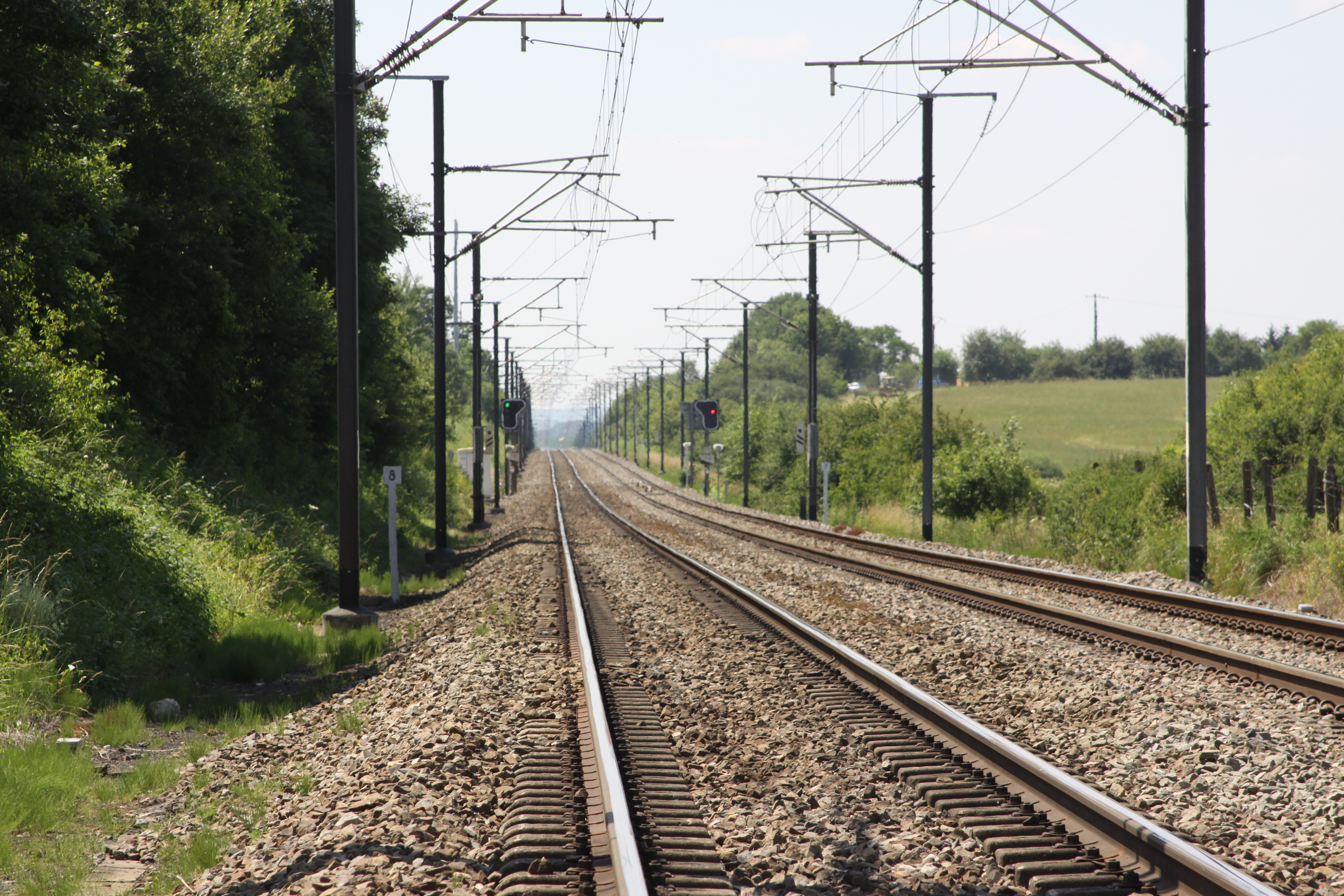 D'SNCB-Linn 165 um Pk 132. SNCB-Linn 165